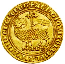 piece de monnaie agneau portant une banniere ou un gonfalon à deux pointes, époque Philippe le Bel